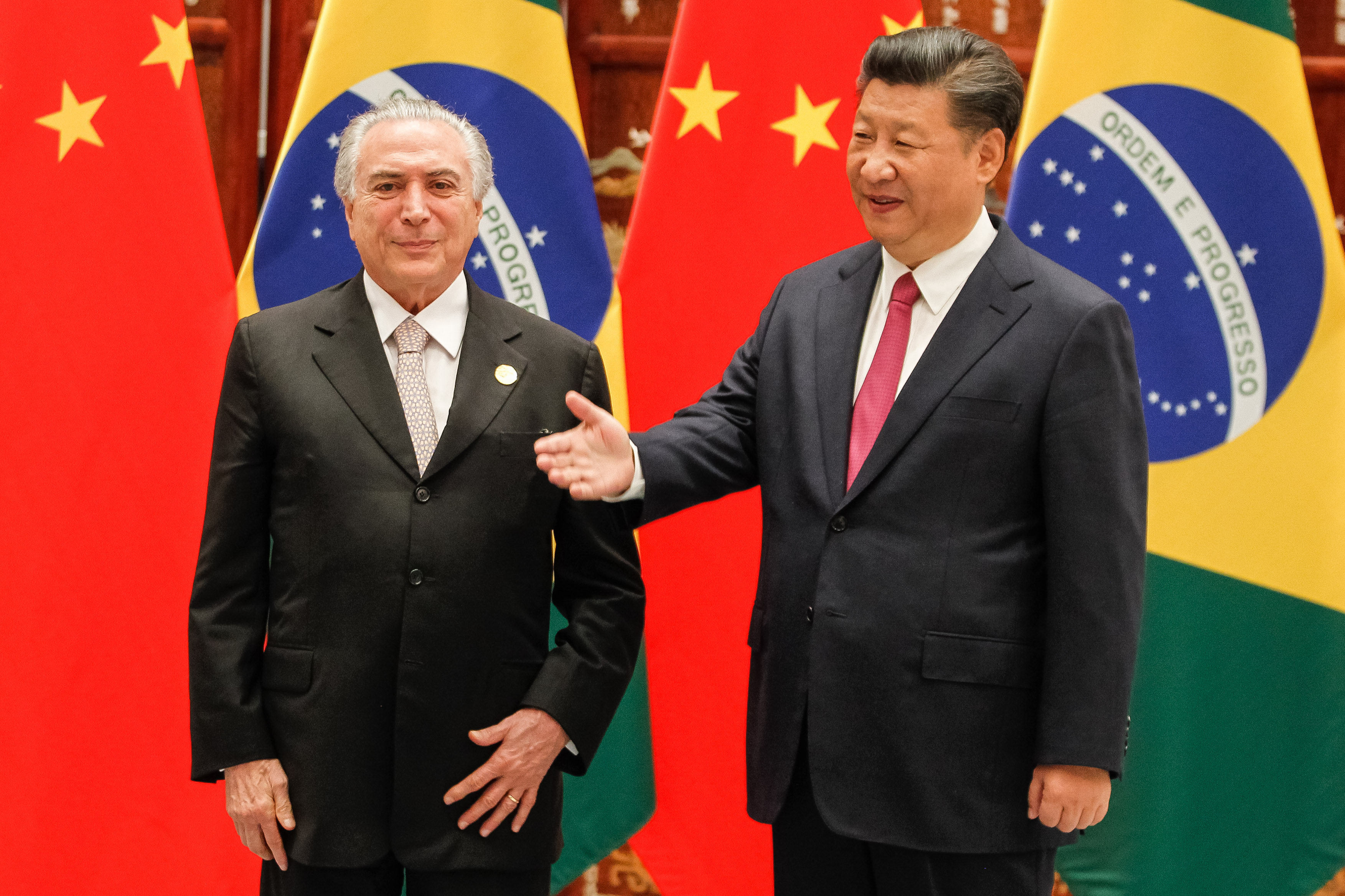 Hangzhou - China, 02/09/2016. Presidente Michel Temer durante encontro com o presidente da República popular da China, senhor Xi Jinping, na casa de hospedes oficial do Lago Oeste. Foto: Beto Barata/PR